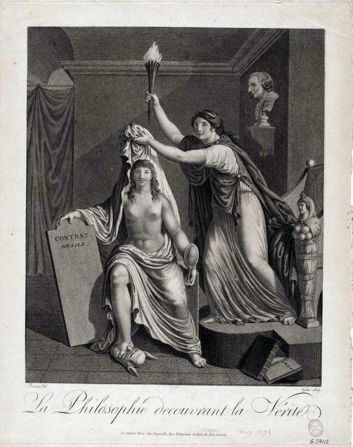 Estampe